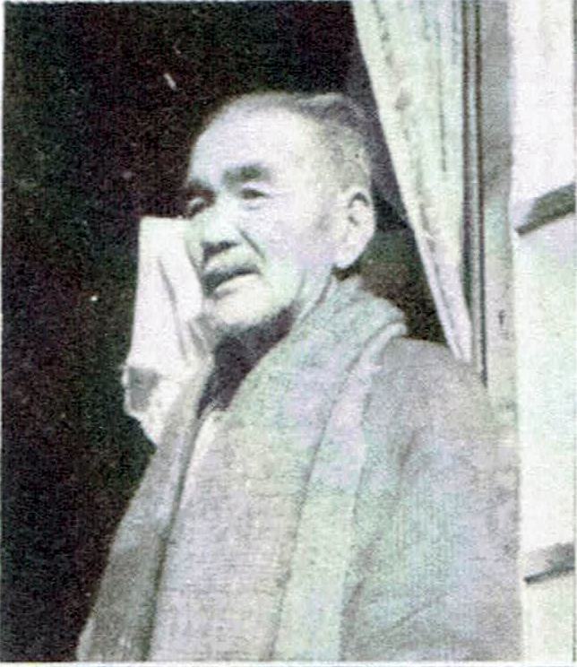 日本現代文学研究会『現代日本小説大系』第42巻（1949）より前田河広一郎